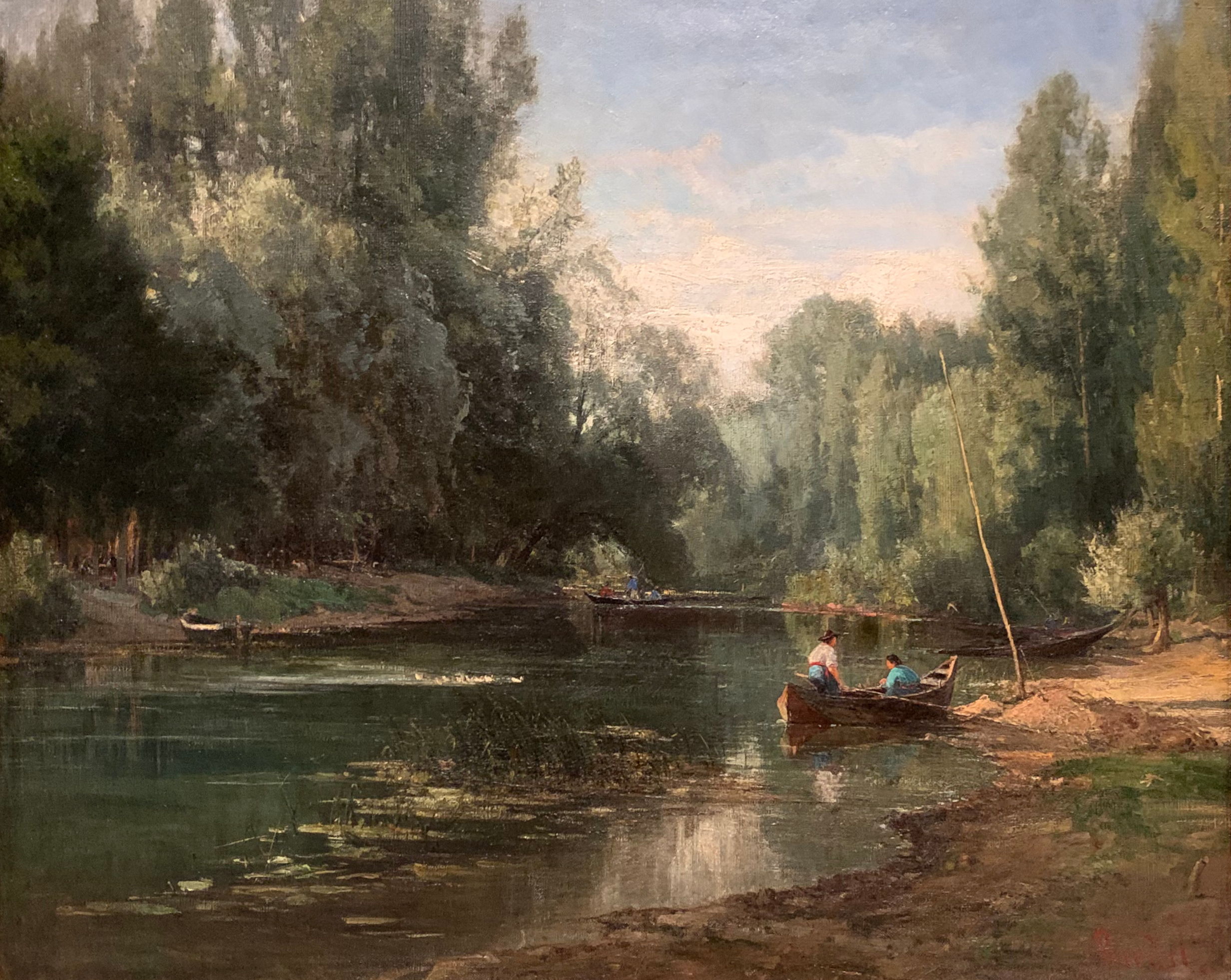 Riedel, Wilhelm - Na rece (1865) (Veletržní palác, Prague).